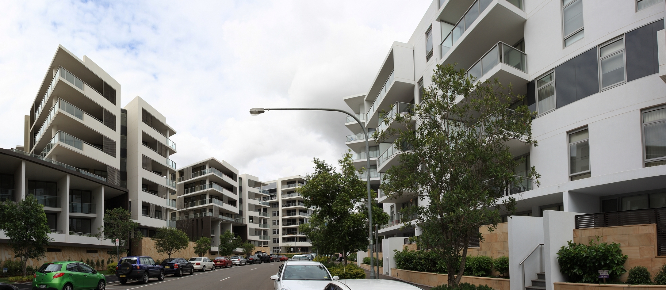 Rhodes, nsw